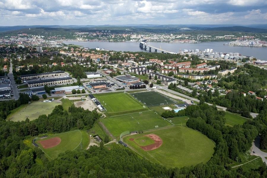 bild över sundsvall mosquitoes basebollplan